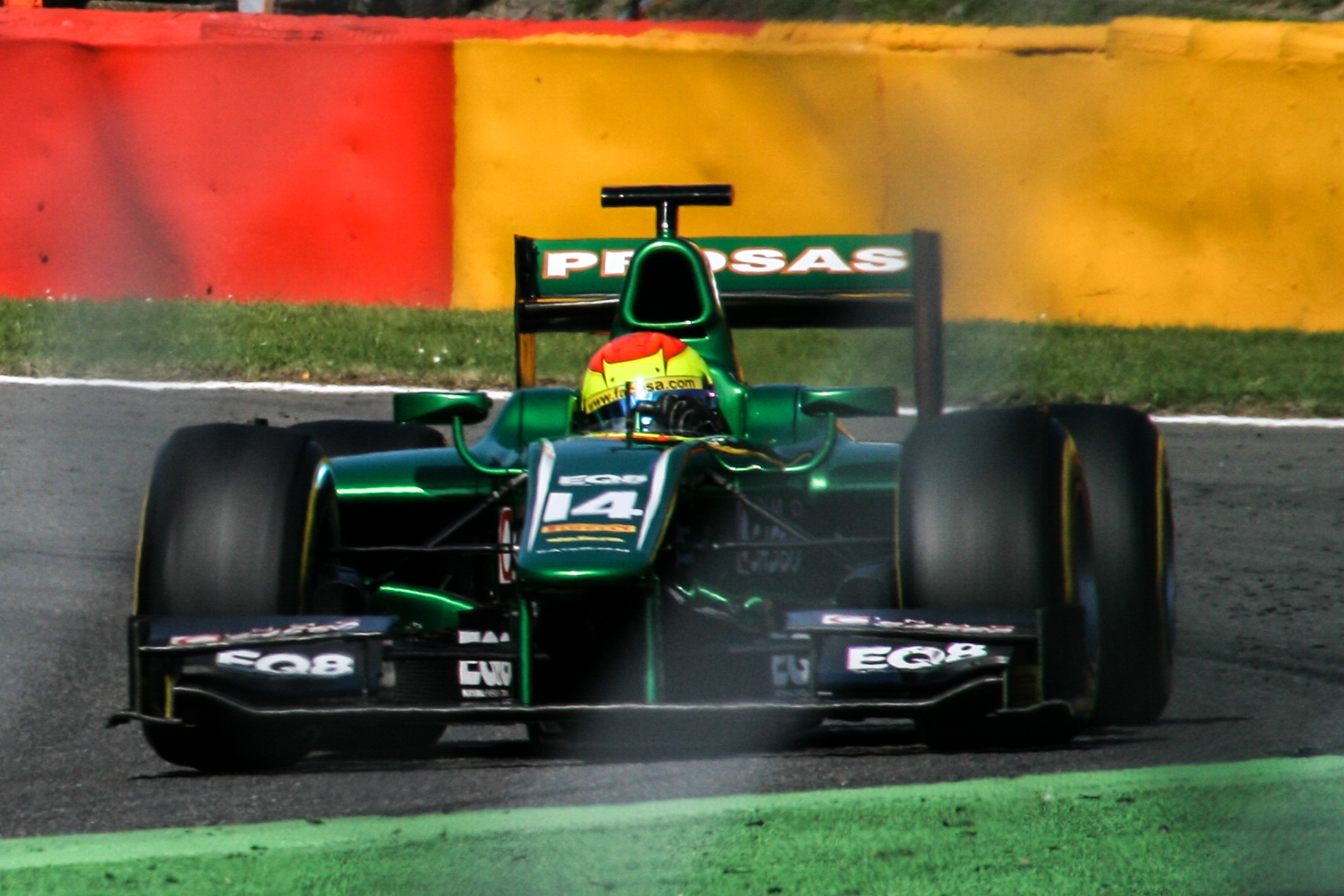 Sergio Canamasas beim Qualifying der GP2-Serie in Spa-Francorchamps 2013